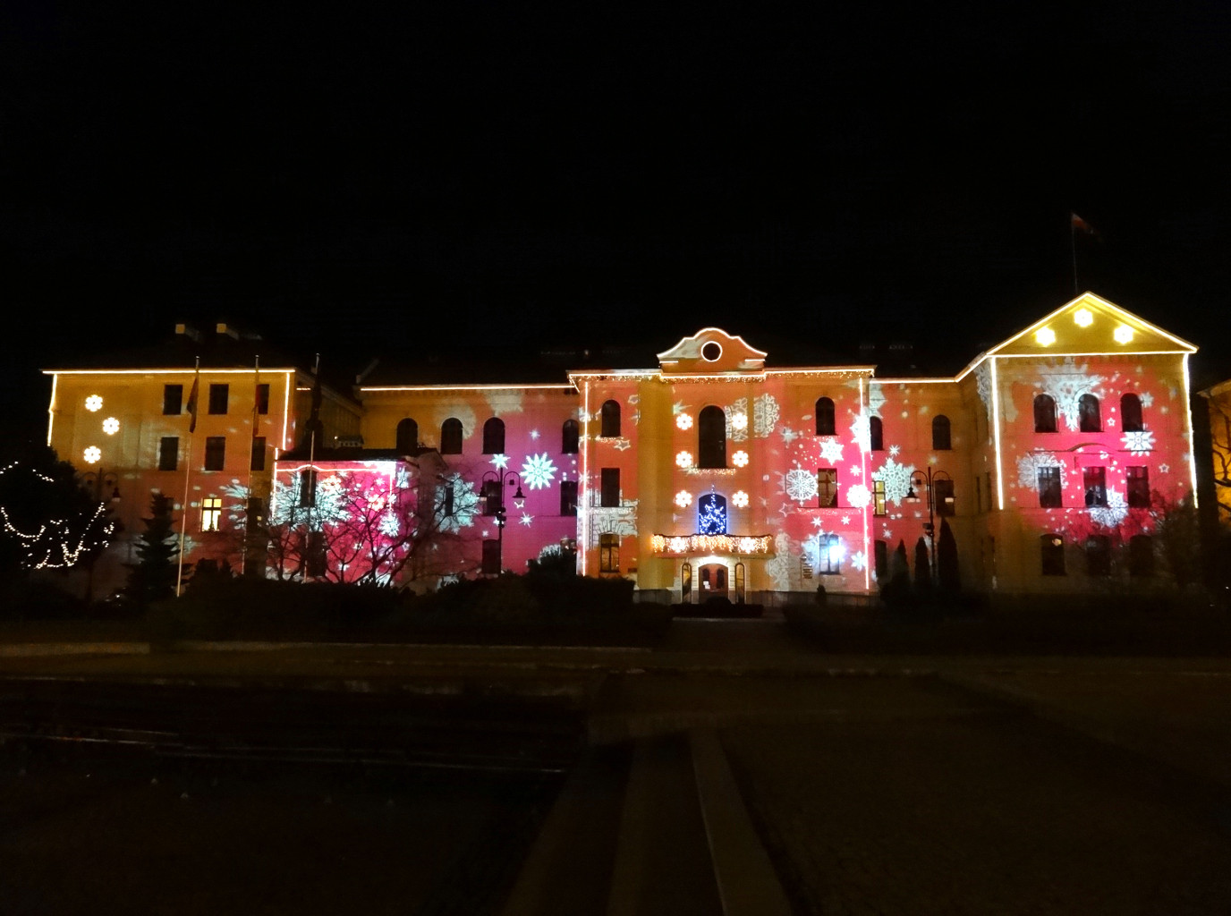 Ratusz w Bydgoszczy przy ul. Jezuickiej (dawne kolegium jezuitów) - widok od Starego Rynku podczas okresu Bożego Narodzenia